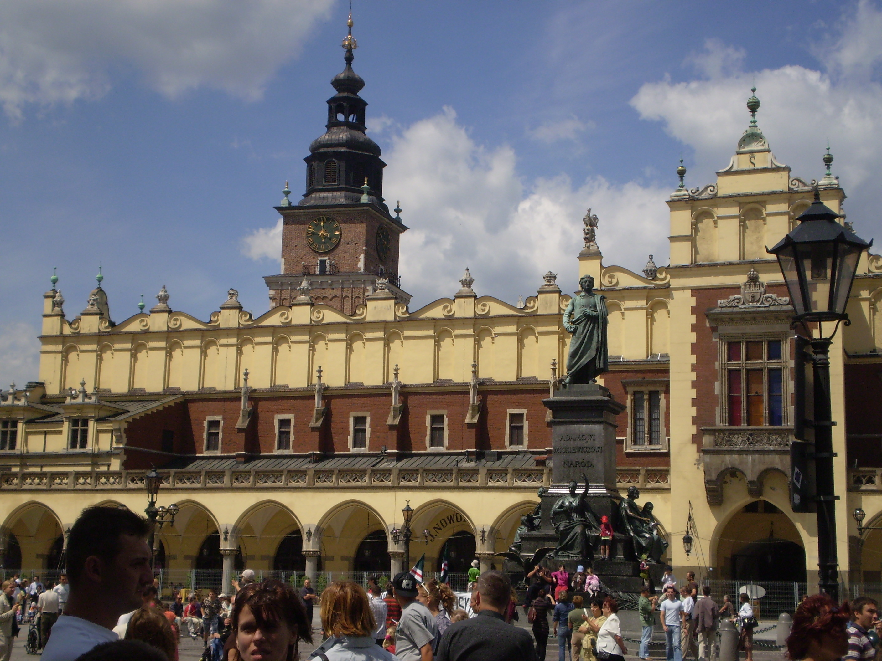 Sukiennice in Kraków, Poland